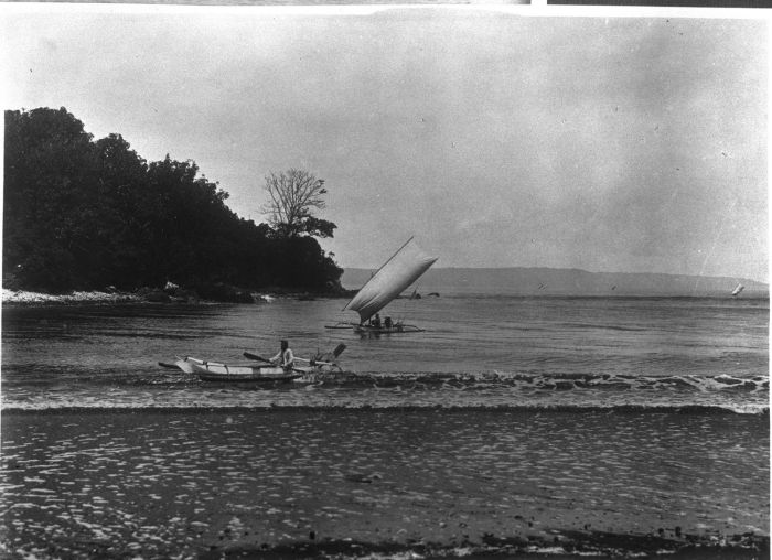 Foto. Oost-Java, de uitmonding van de Bedadoeng rivier, de "Plawangan" Poeger bij Djember, in de Indische Oceaan.